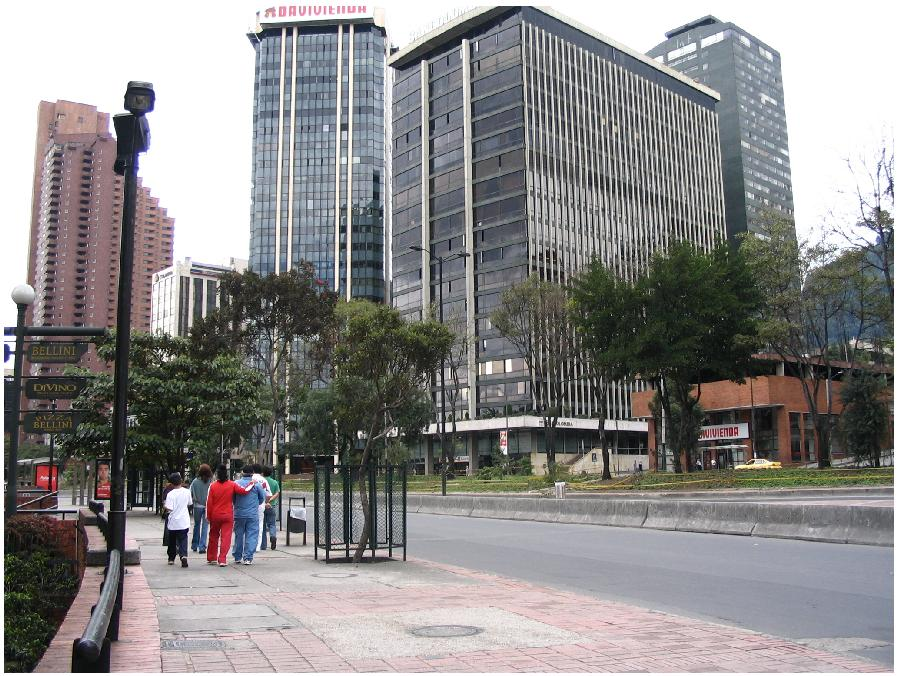 Edificios en el barrio San Martín cerca del Centro Internacional de Bogotá. Fotografía Tomada por Tequendamia para la wikipedia.